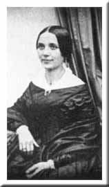 photo de la mère de Nietzsche, vers 1850. Sauf erreur Domaine public